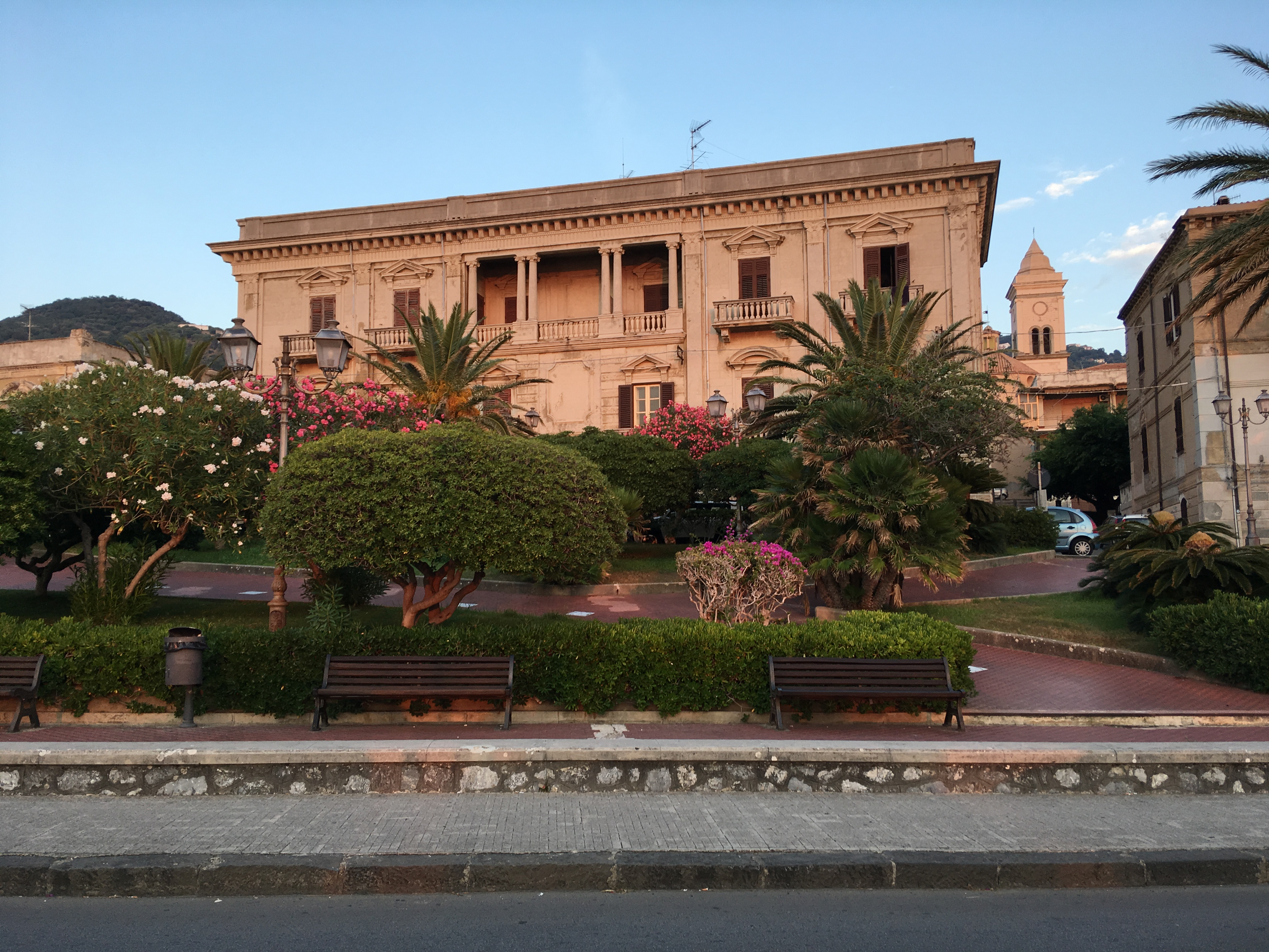 Particolari della Villa Comunale - Gioiosa Marea